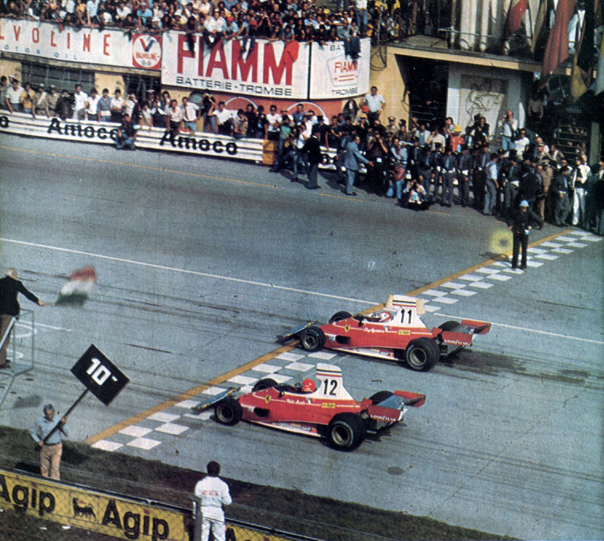 Monza, Autodromo Nazionale, 7 settembre 1975. I due piloti della Scuderia Ferrari, lo svizzero Clay Regazzoni (n. 11) e l'austriaco Niki Lauda (n. 12), questo ultimo poleman, scattano in testa alla partenza del XLVI Gran Premio d'Italia a bordo delle loro Ferrari 312T.